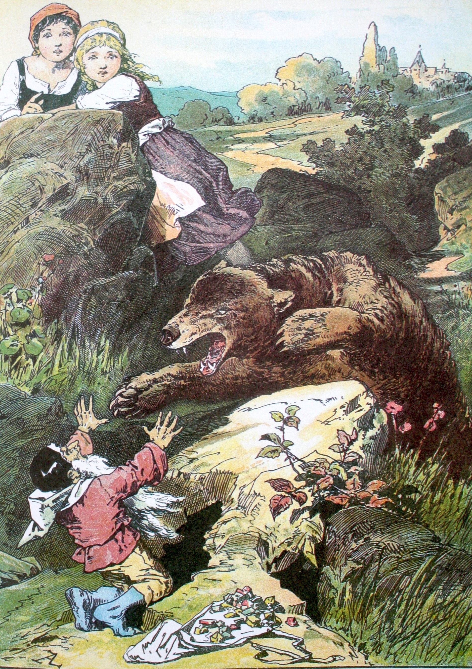 Schneeweisschen und Rosenrot; Darstellung von Alexander Zick (1845 - 1907)